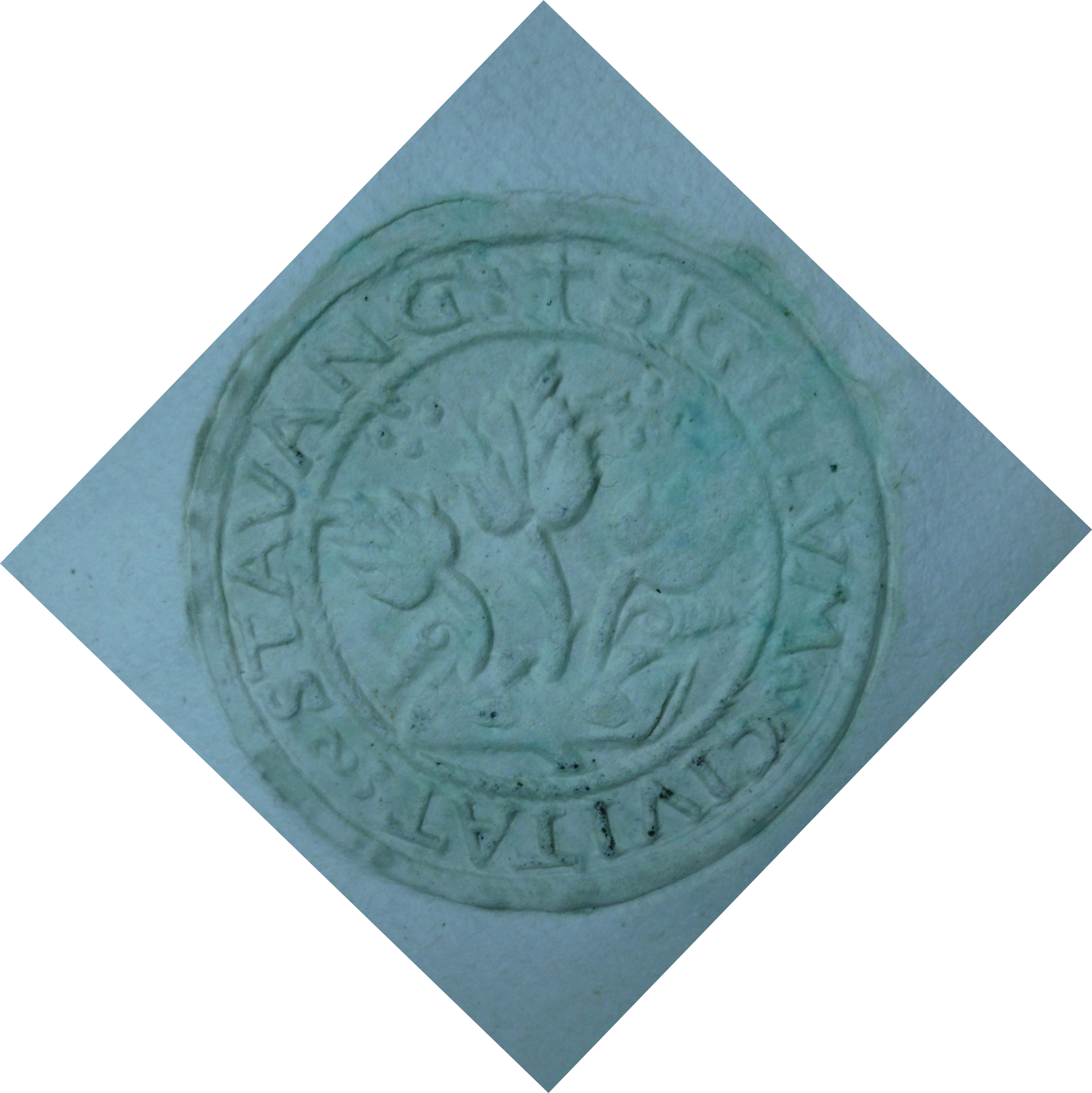 Stavanger bysegl fra et avtrykk i 1640. Kilde: Riksarkivet, Stavanger byregnskap, 1624-1639. Arms of the city of Stavanger in 1640.